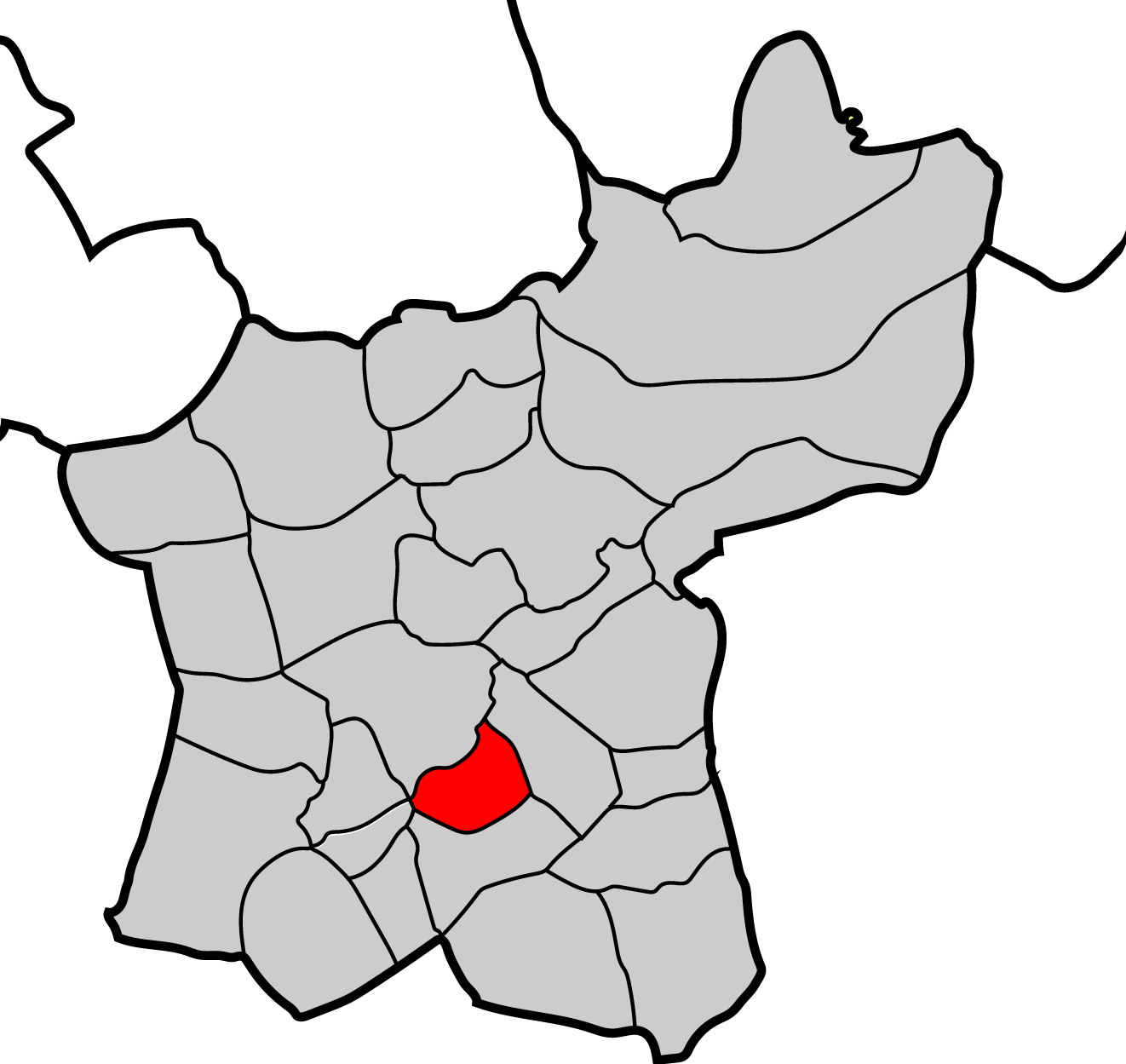 Mapa parroquia de Aranza Baralla